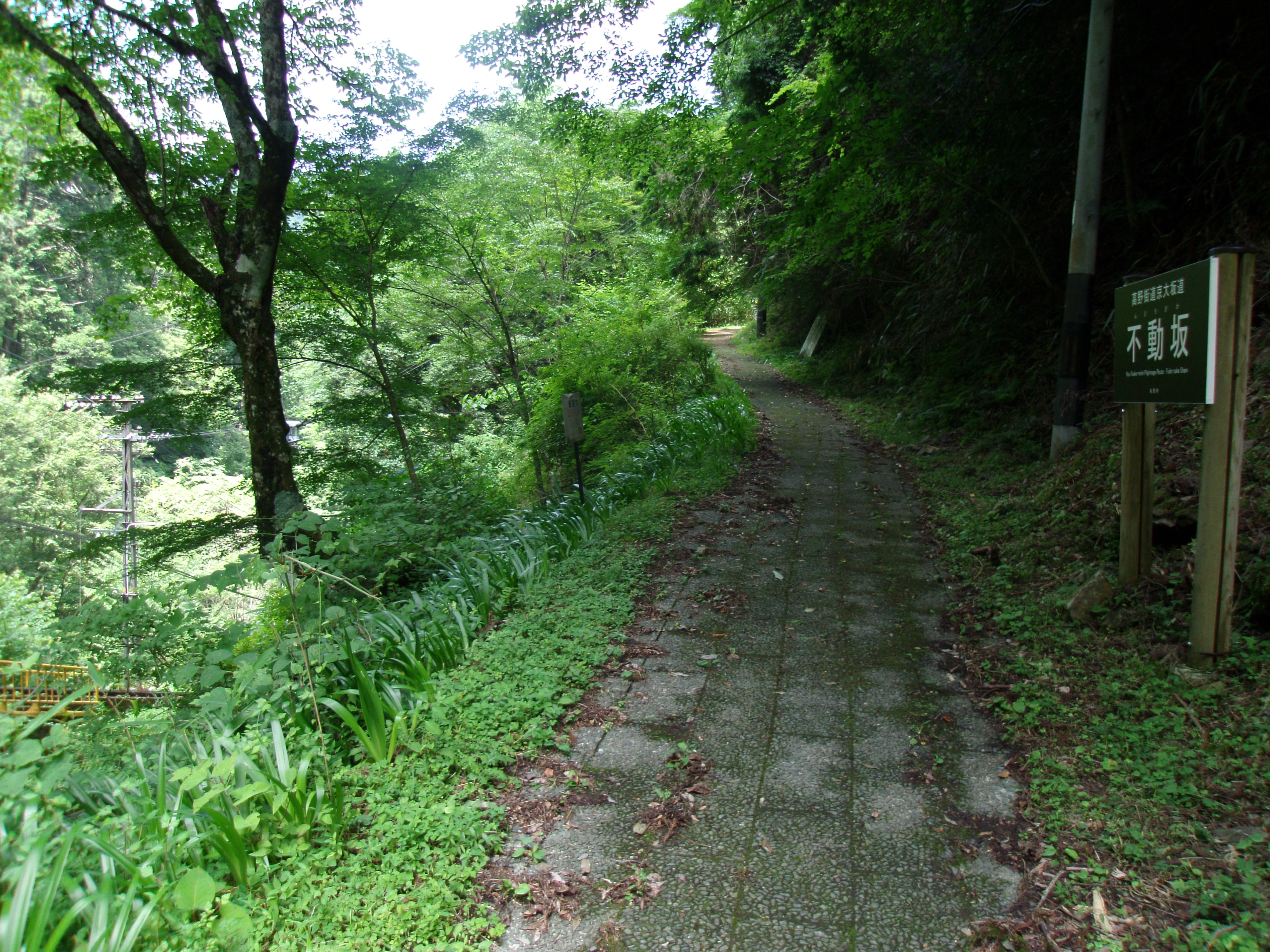 2016年に世界遺産「紀伊山地の霊場と参詣道」に「高野参詣道」として追加登録された京大坂道（きょうおおさかみち）の不動坂新道、左側に高野山ケーブルカーの軌道が見える